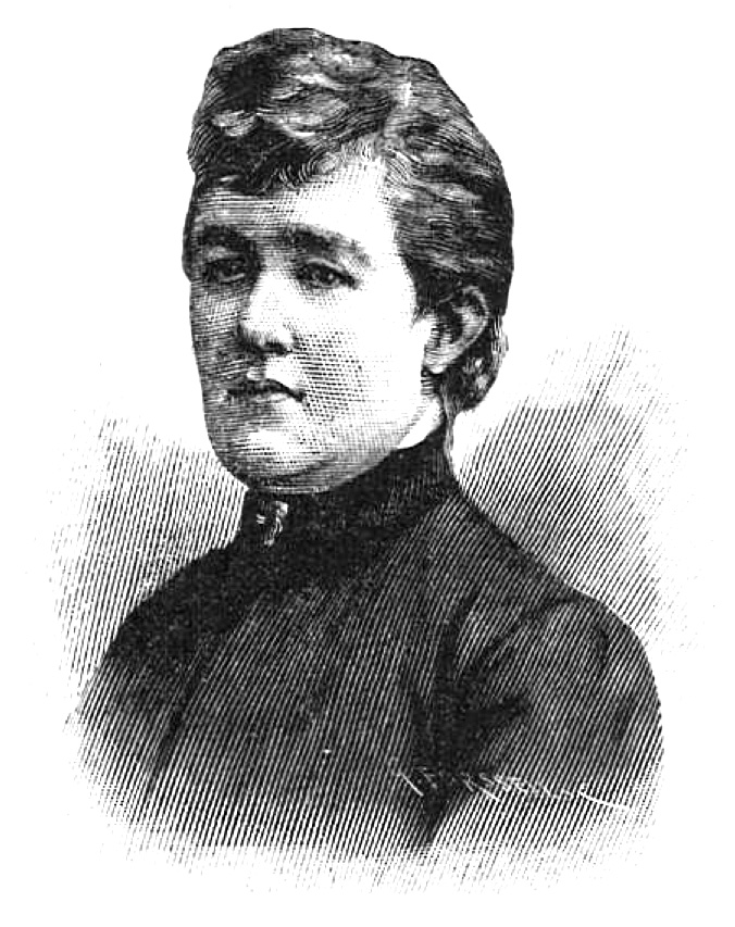 Olivia Nordqvist